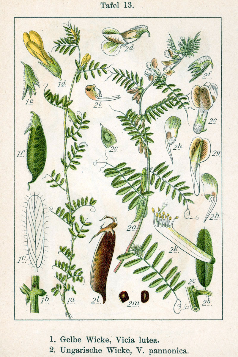 Vicia lutea L., Vicia pannonica Crantz Original Description 1. Gelbe Wicke, Vicia lutea 2. Ungarische Wicke, Vicia pannonica